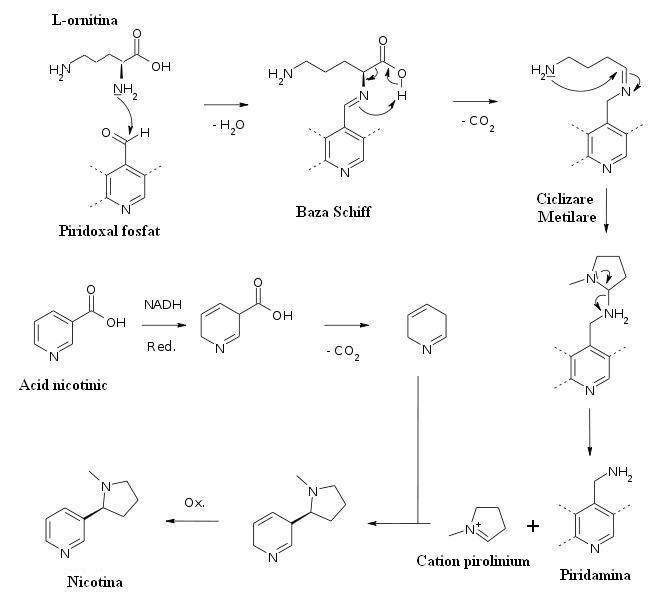 Sinteza nicotinei